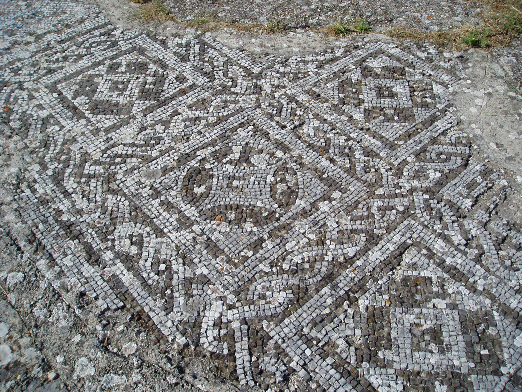 Arheološka zona Bribirska glavica